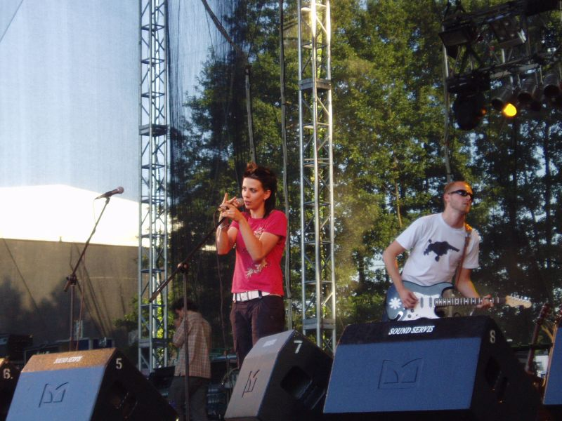 Aneta Langerová - Rock for People 2006